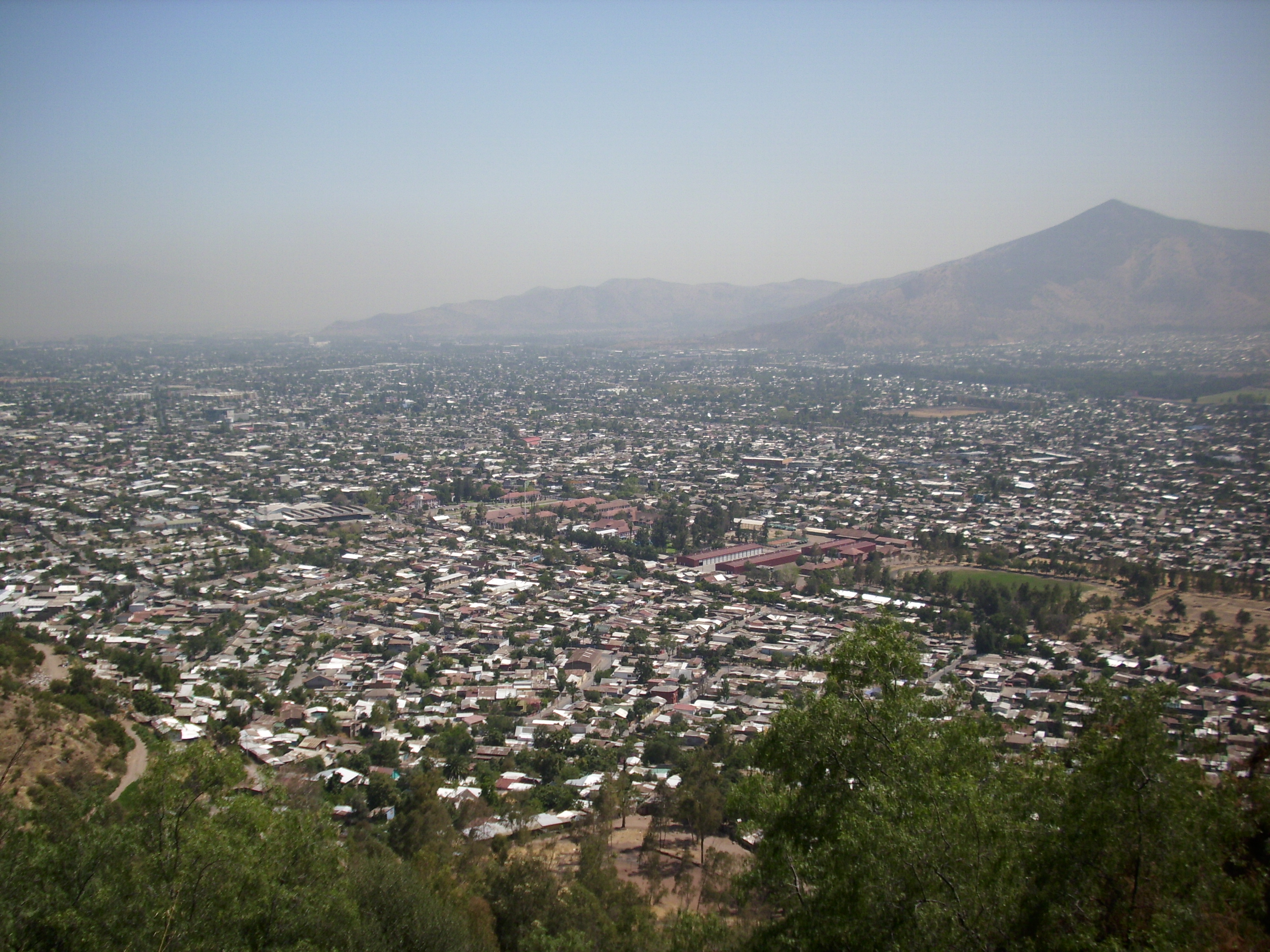 La comuna de Recoleta vista desde la avenida Alberto Mackenna (Parque Metropolitano de Santiago - Cerro San Cristóbal). Santiago de Chile, 2 de marzo de 2011.